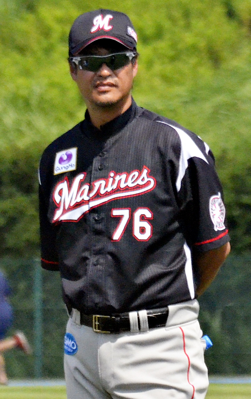 大村コーチ